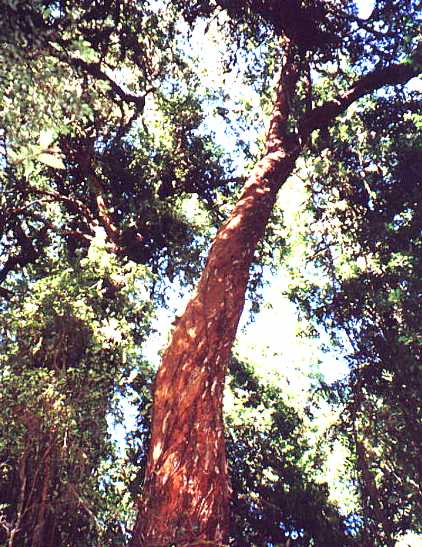 Luma Apiculata trunk of elder tree, Parque Nacional Los Arrayanes, Argentina